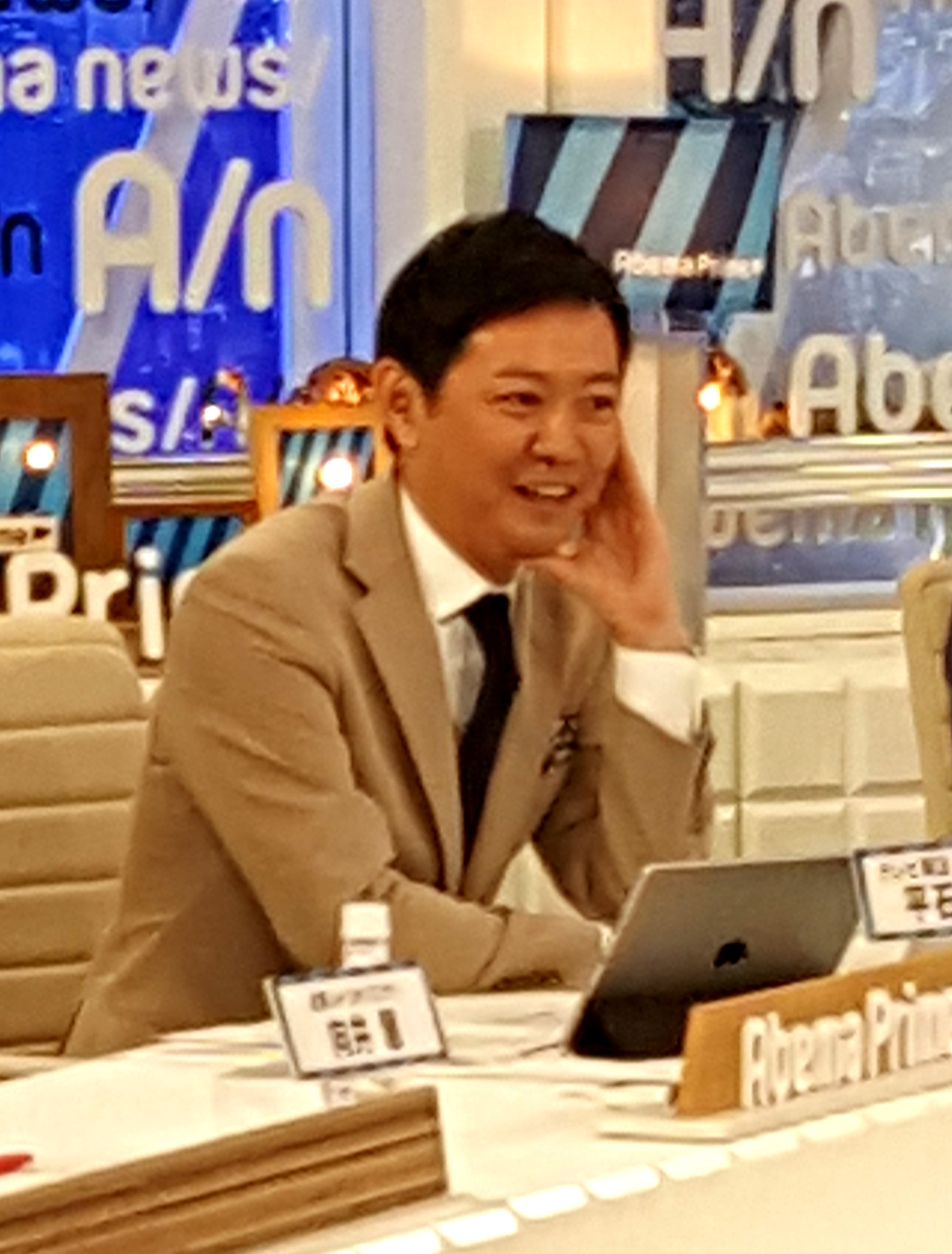 AbemaPrime 平石直之